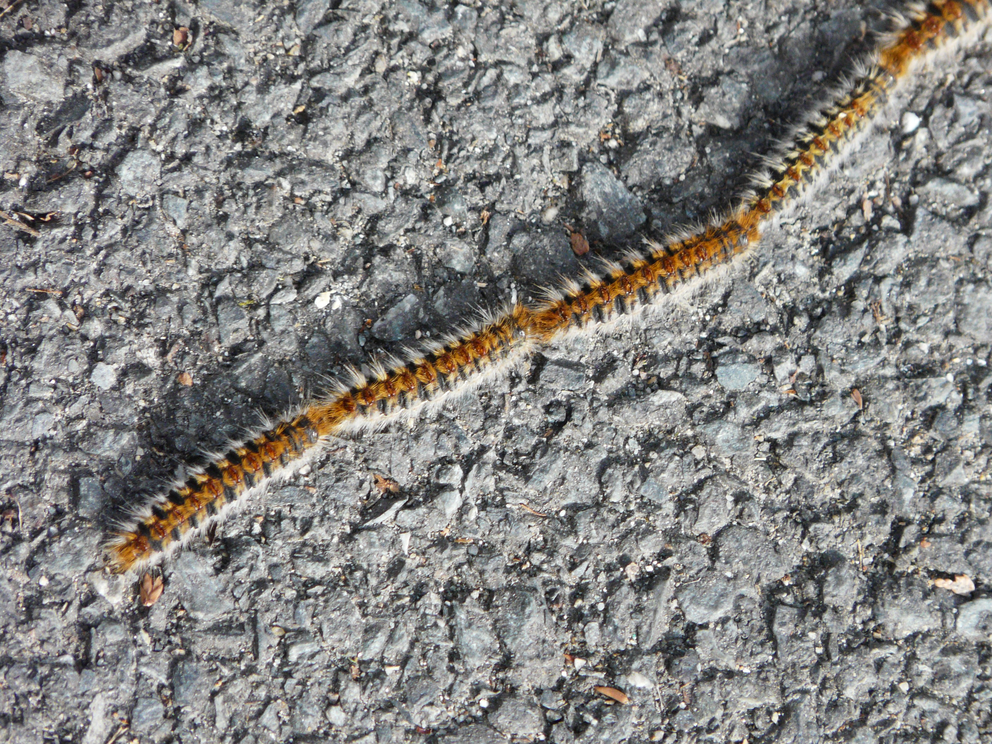 Chenilles processionnaires du pin (Thaumetopoea pityocampa), Périgueux, Dordogne, France. La queue de la procession.